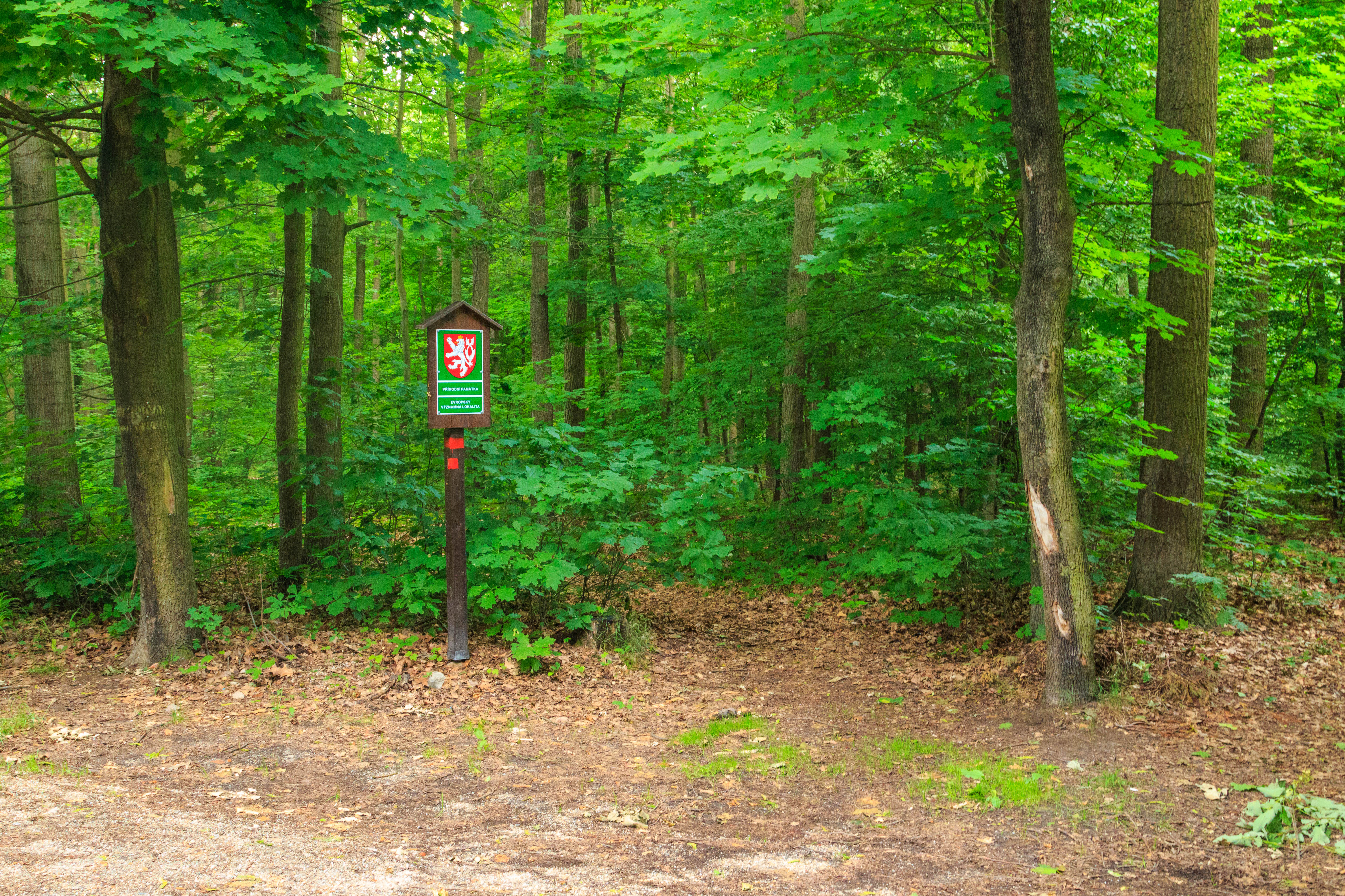 Přírodní památka Olešnice Project: Chráněná území.